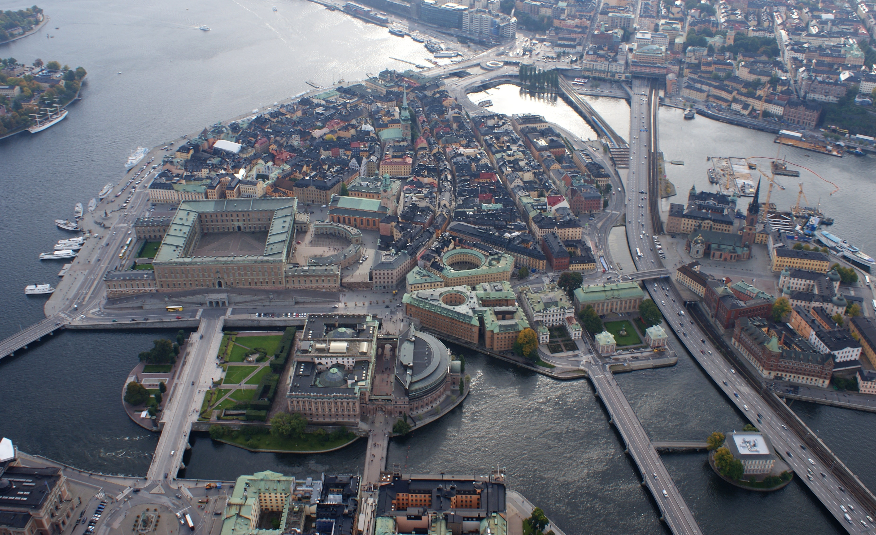 sedd från helikopter.